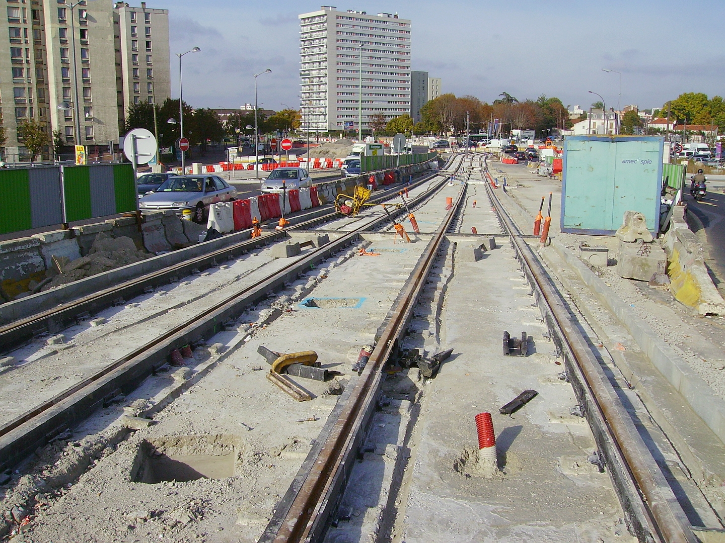 Le chantier du tramway T2 à Bezons le 28 octobre 2010.